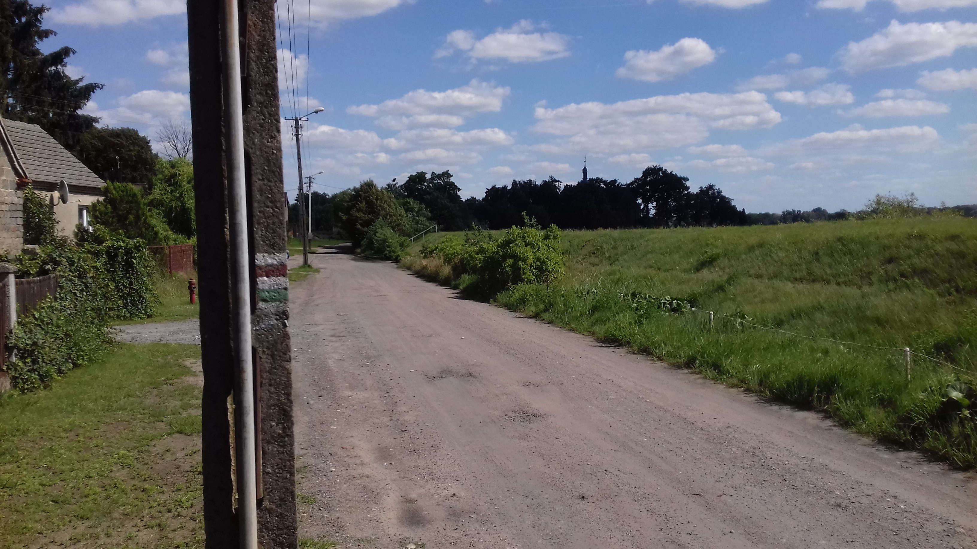 Oznaczenie szlaków turystycznych nr 186 (czerwonego) i nr 3577 (zielonego) przy ulicy Wodnej w Rogalinku